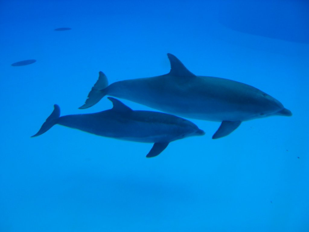 Parc Asterix - Paris - France